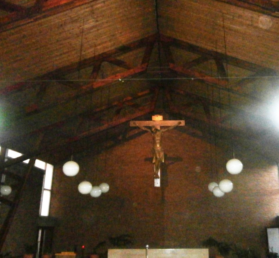 Façana de la Parròquia del Crist Redemptor, Guinardó.